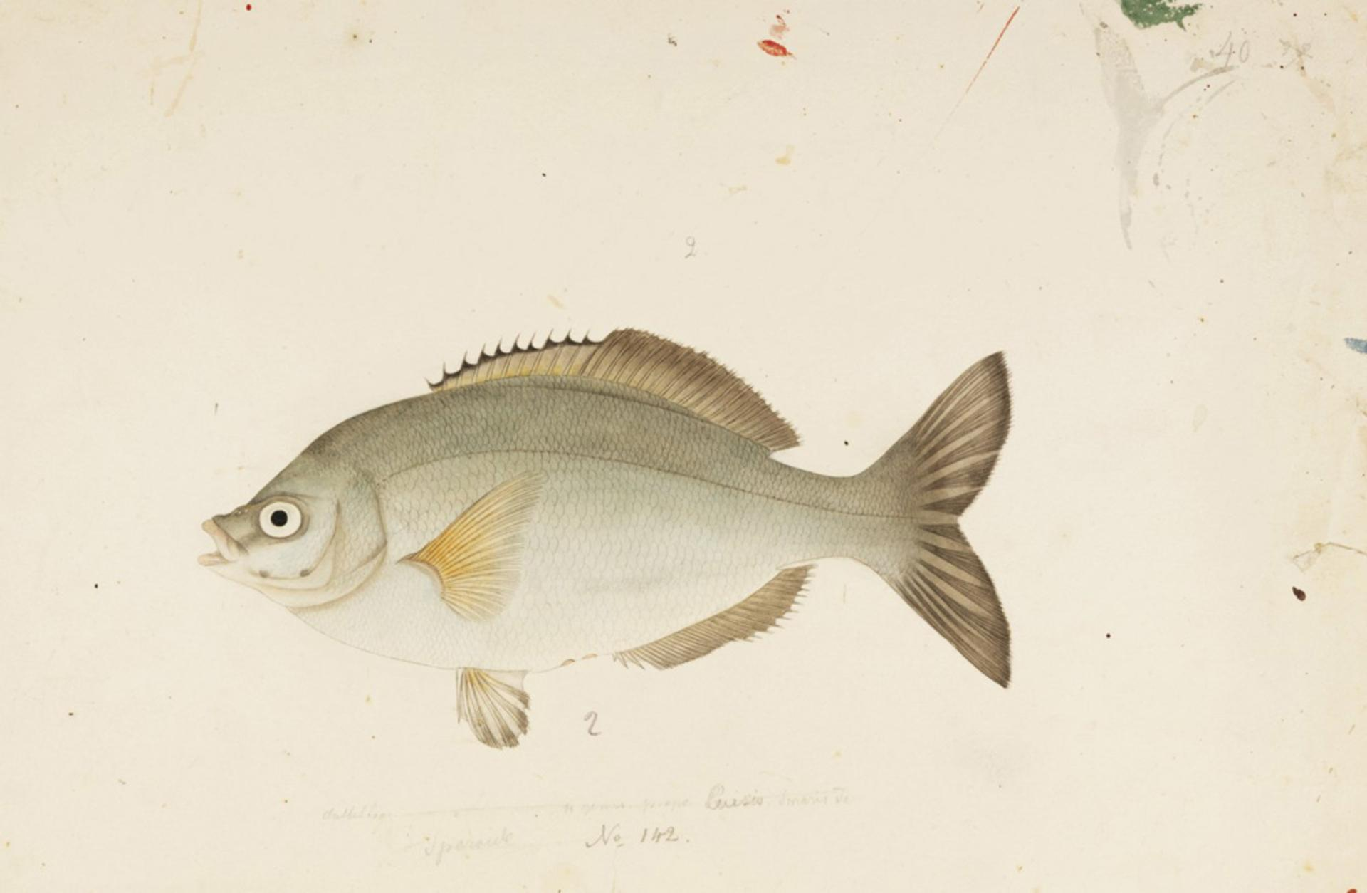 Ditrema temminckii Bleeker